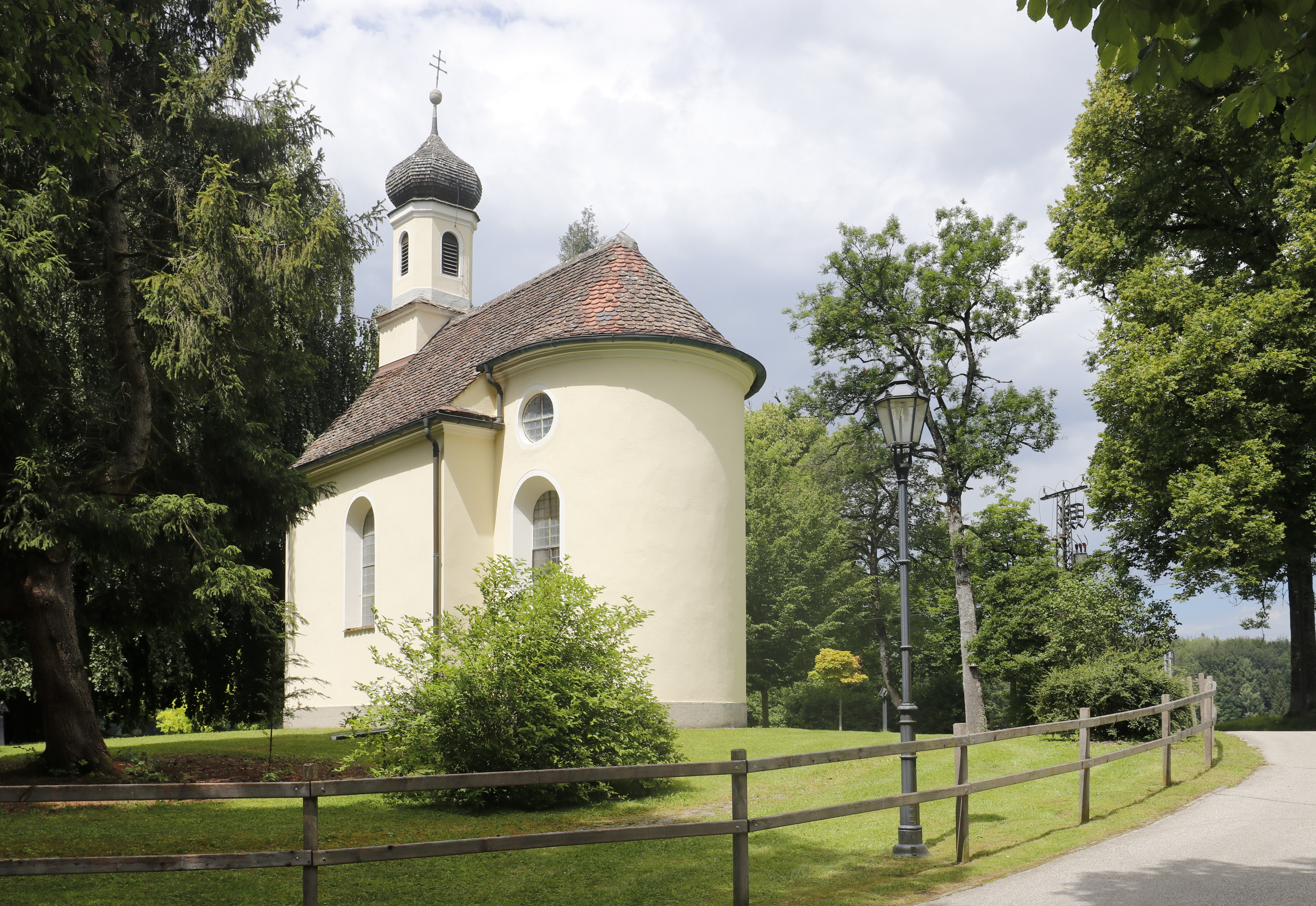 Kapelle von Gut Rothsee, Landkreis Weilheim-Schongau